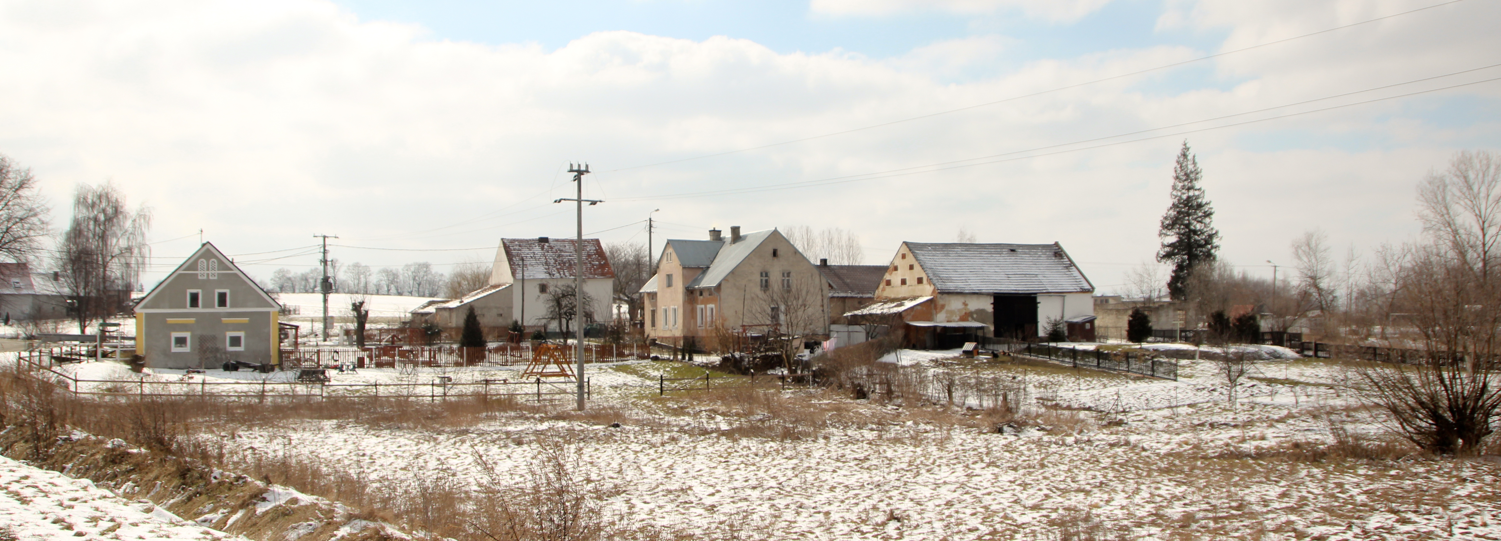 Kijów – wieś w Polsce, w województwie opolskim, w powiecie nyskim, w gminie Otmuchów.